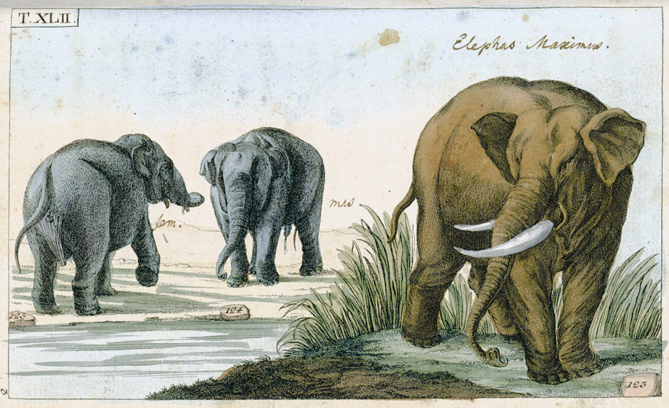 Elephas Maximus, aus: Gottlieb Tobias Wilhelm: . Unterhaltungen aus der Naturgeschichte. Der Säugethiere erster [und zweyter] Theil. Zweyte völlig umgearbeitete sehr vermehrte Ausgabe, Augsburg, Martin Engelbrecht, 1806-1808